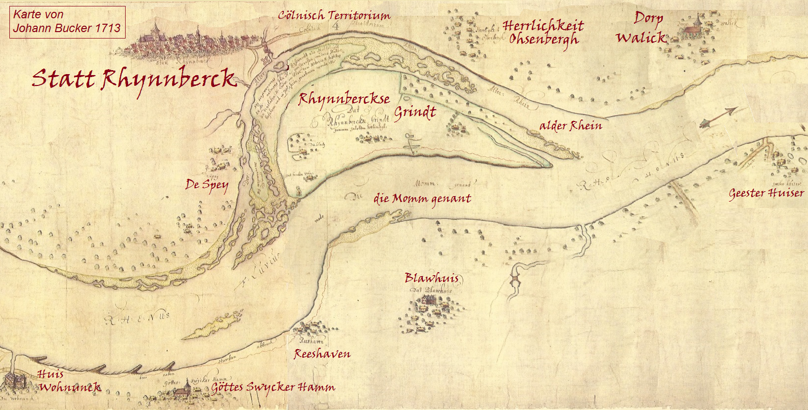 Rheinkarte von Johann Bucker, Rhein bei Rheinberg anno 1713 (LAV NRW R, RW Karten Nr. 4801)